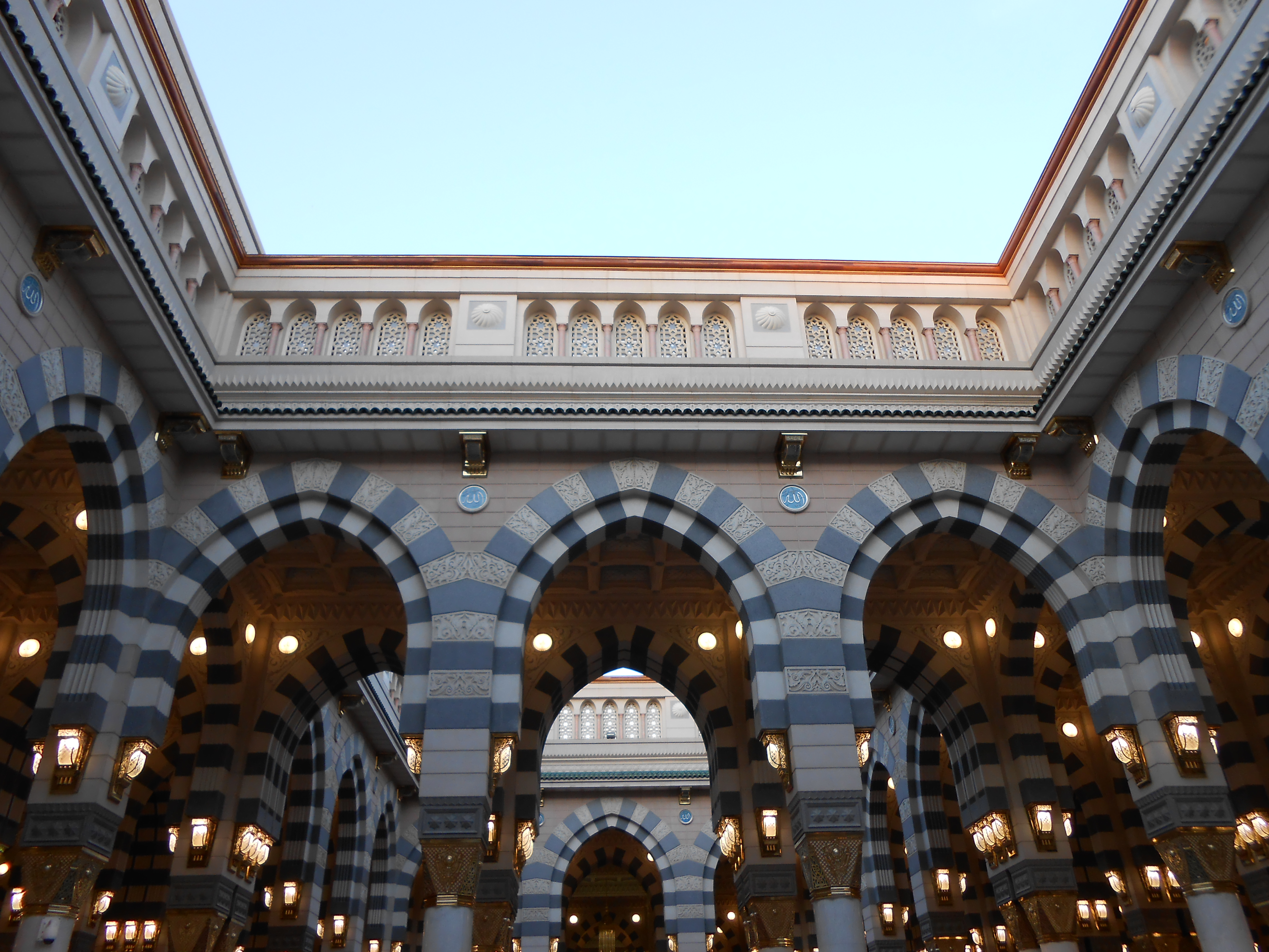 Inside Masjid.e.Nabavi